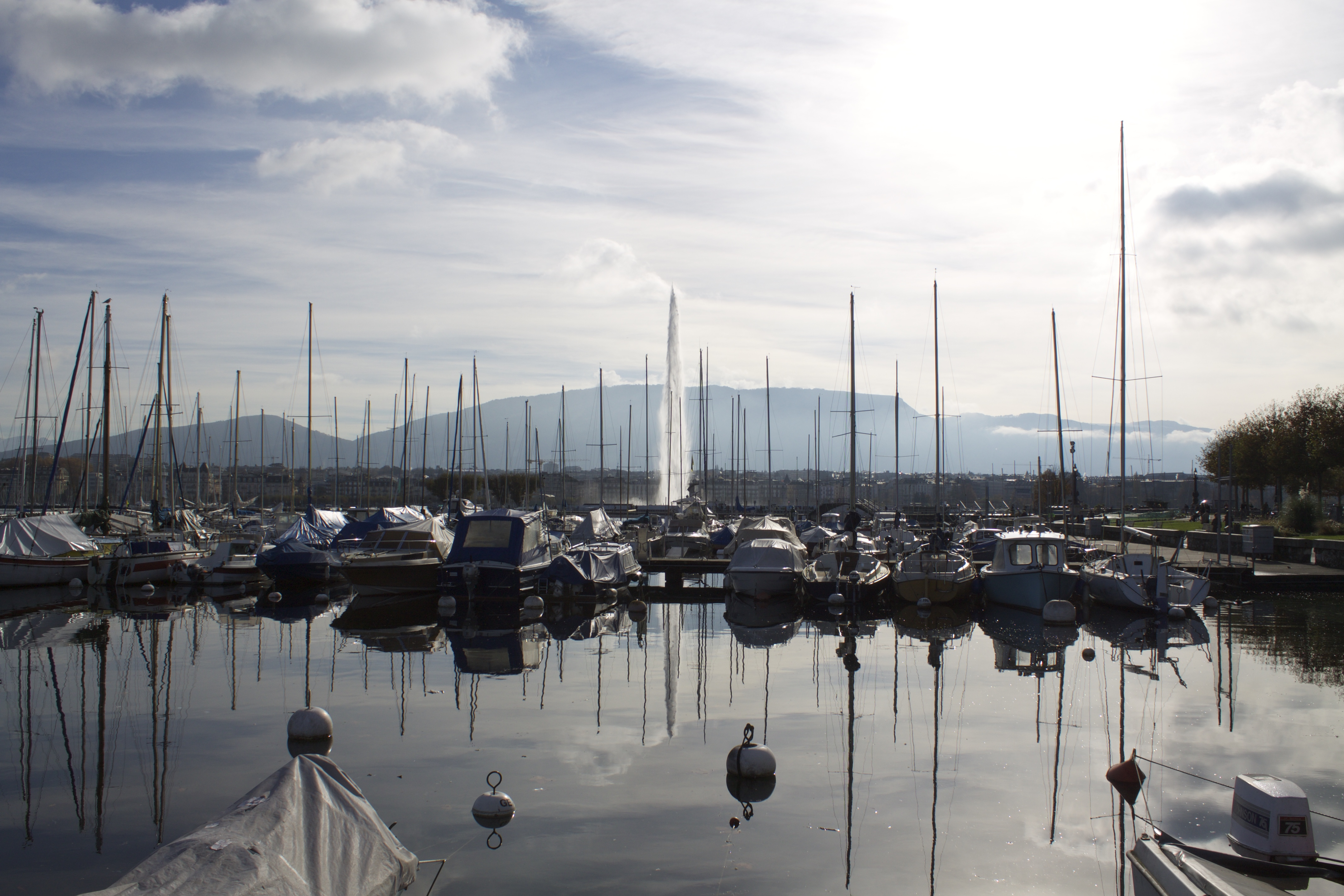 Genève